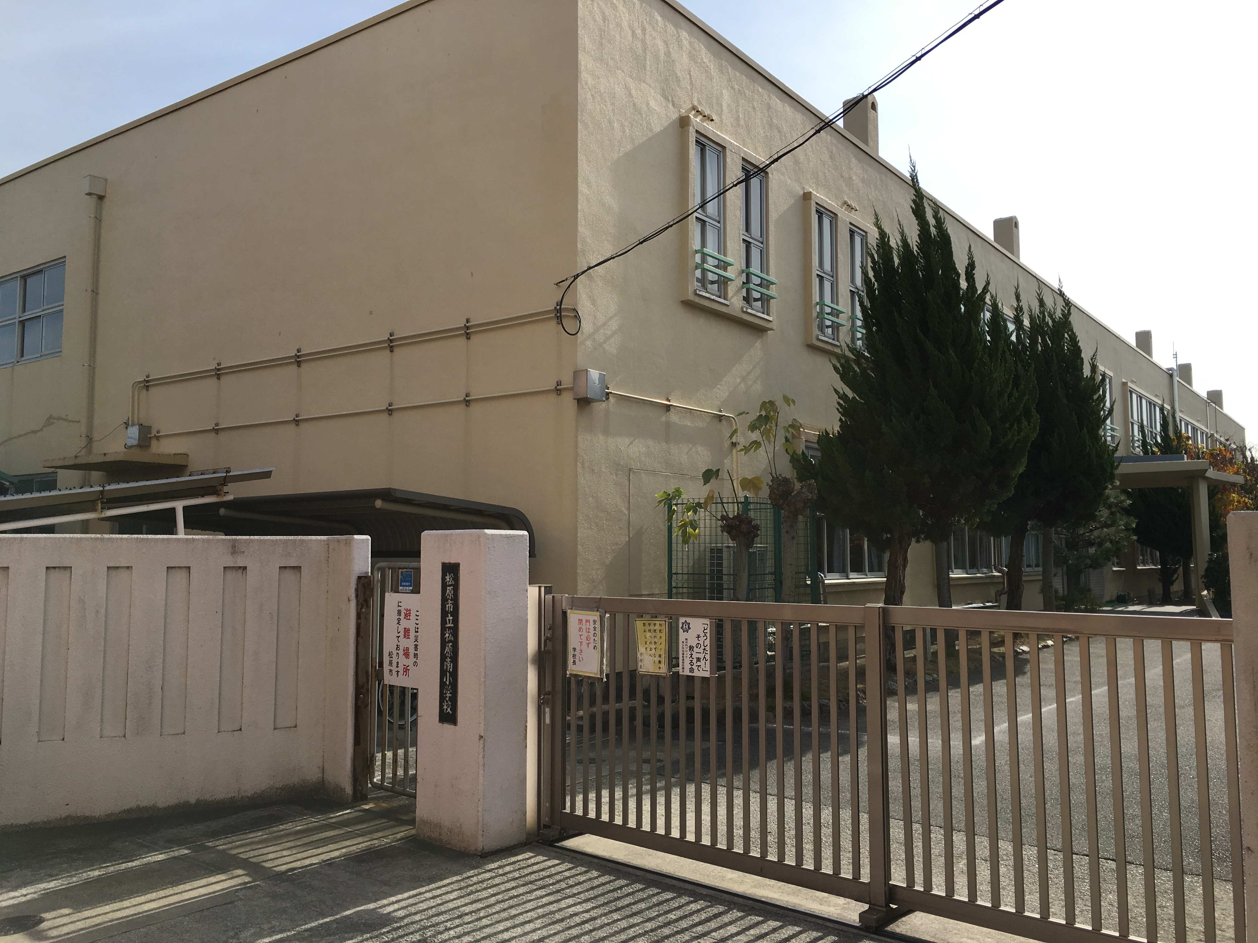 松原市立天美南小学校